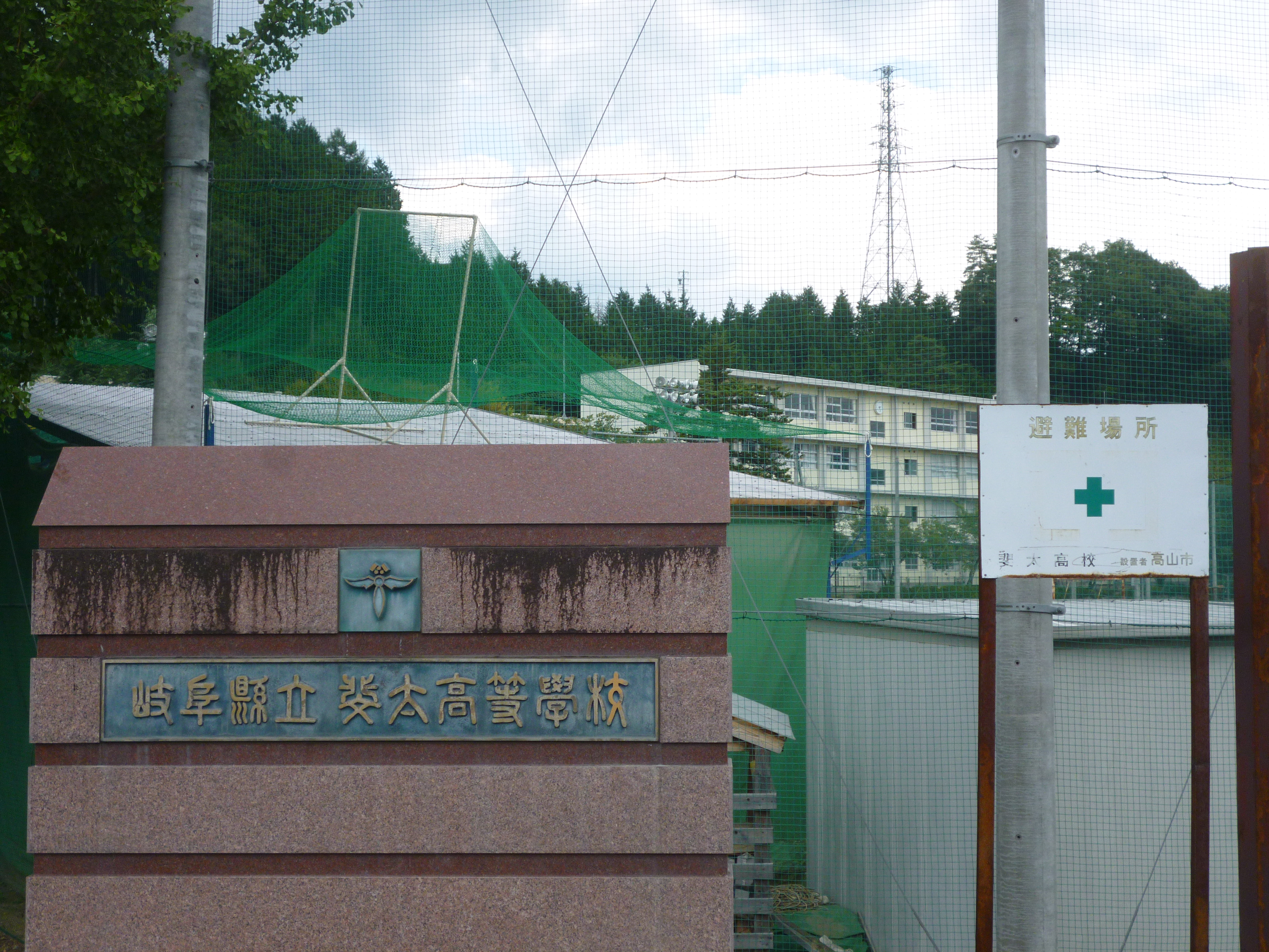 斐太高等学校を校門前より写す